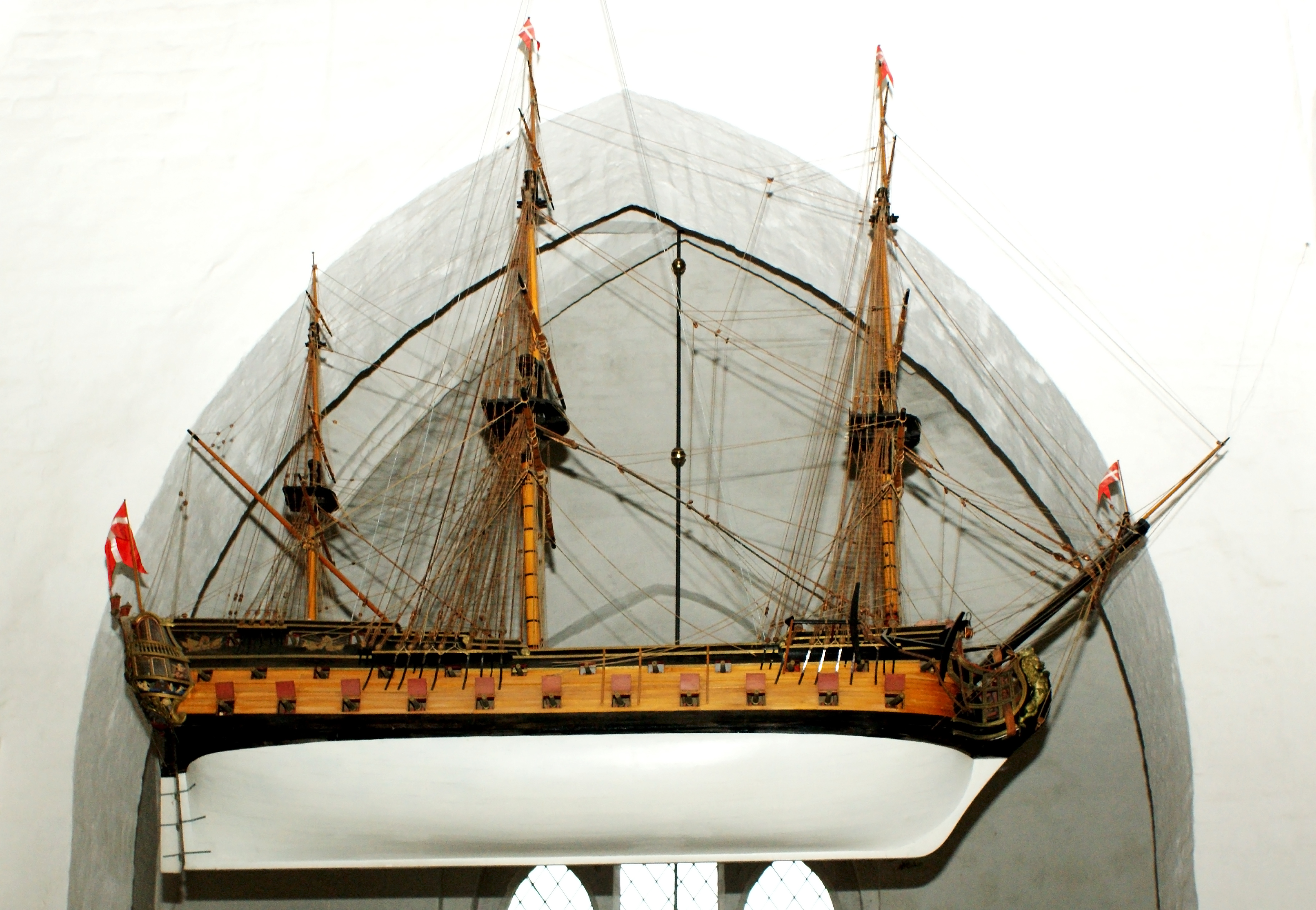 Kirkeskib Haderslev Domkirke, linieskibet Fyn fra 1950